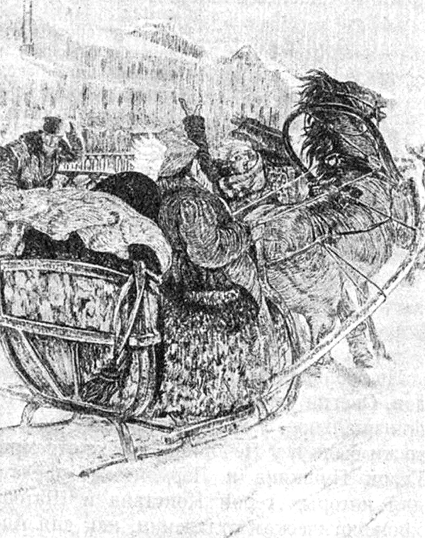 D. Kardovsky. Illustration for the story "The Princess Ligovski" 1914